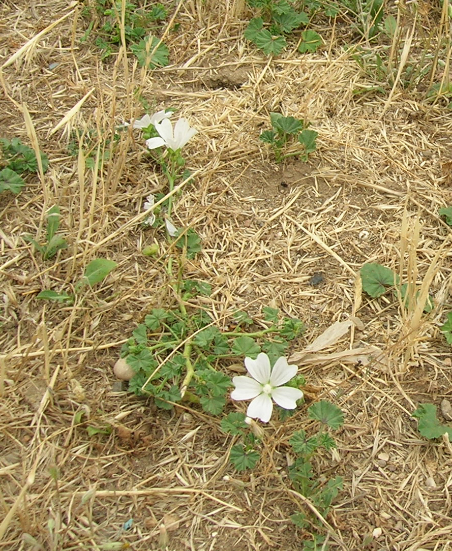 Malva bianca nella Riserva Naturale Valle dell'Aniene Roma (oppure Althaea)